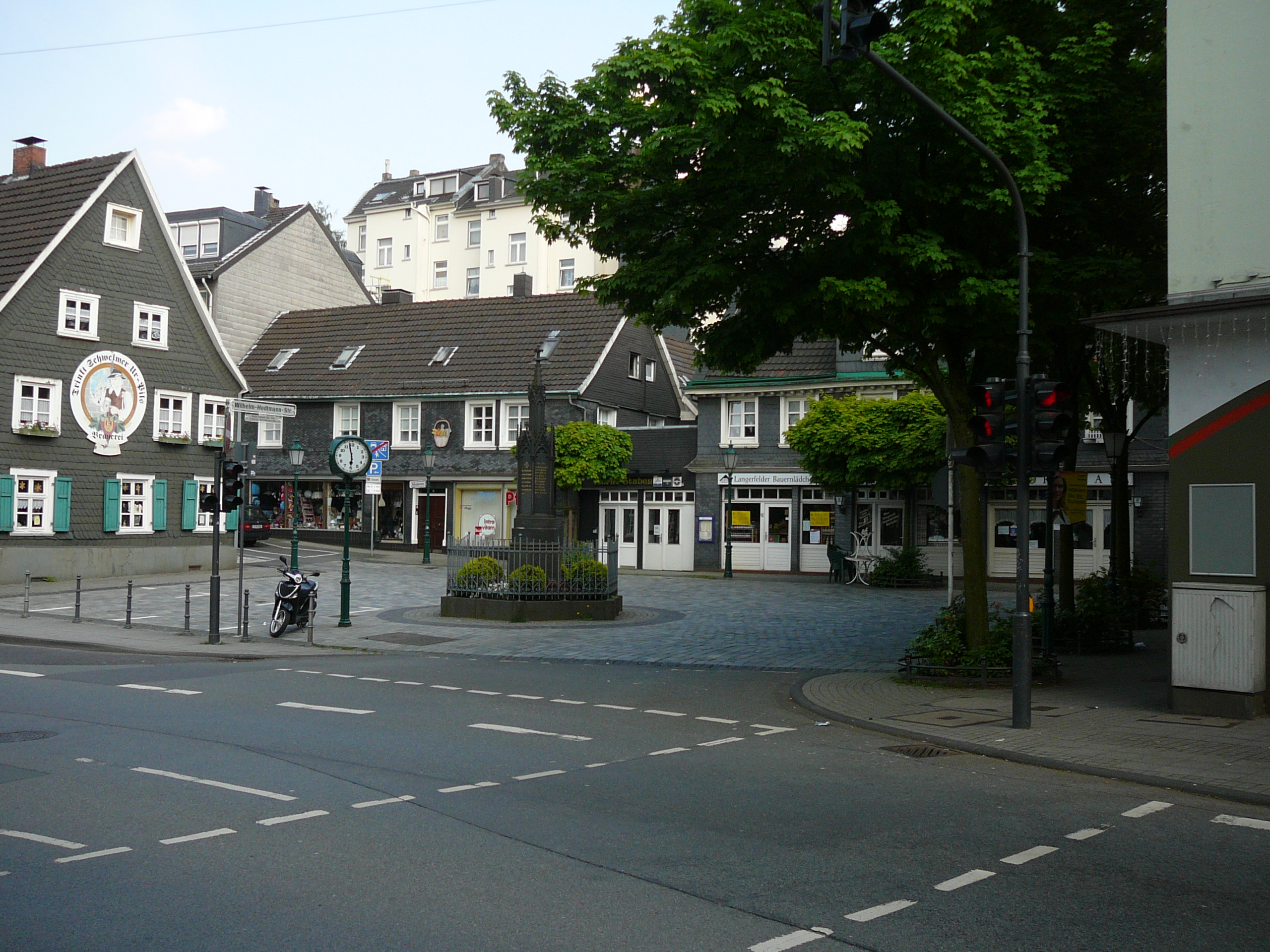 Langerfelder Straße, Wuppertal